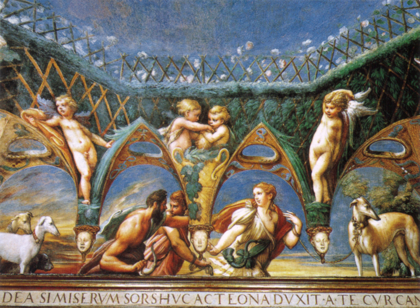 detail